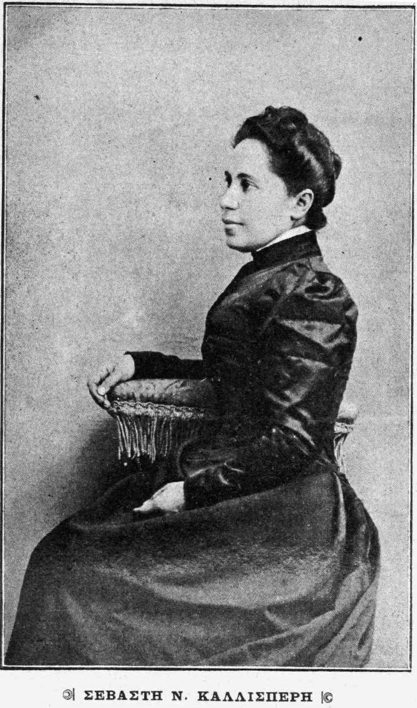 Sebasti Kallisperi, griechische gelehrte Frau, 19. Jahrhundert